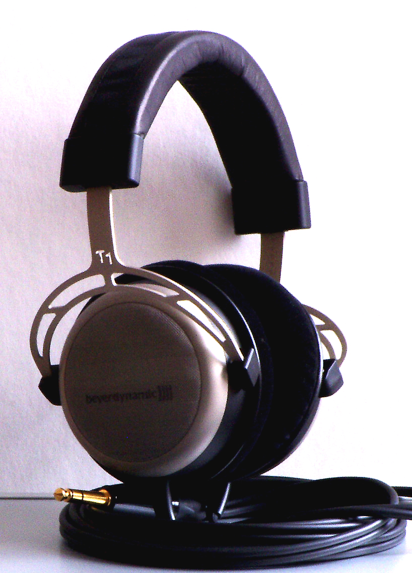 Referenzkopfhörer Beyerdynamik Tesla1